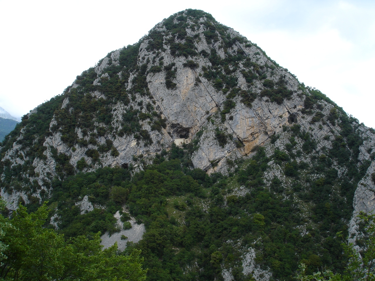 I Monti della Meta, sono una piccola catena montuosa nella zona del confine tra Lazio, Abruzzo e Molise che prende il nome dalla cima più affascinante e appariscente, il monte Meta.